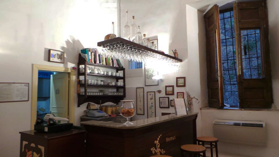 Tisaneria del giardino della minerva di Salerno